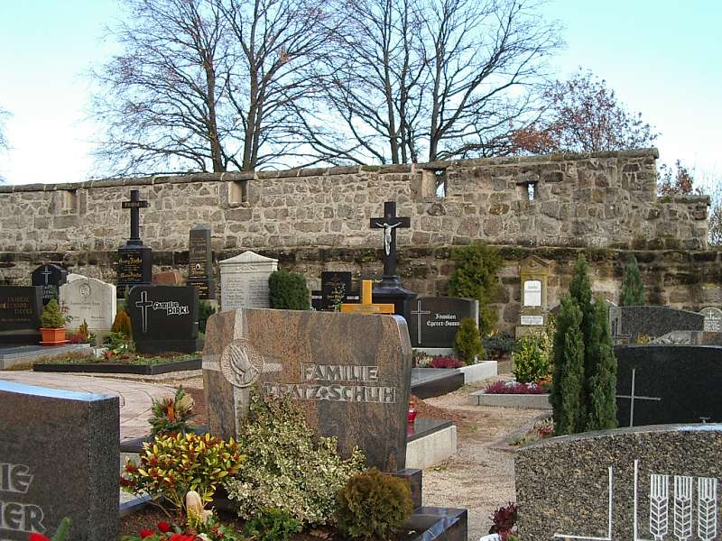 Veitsbronn bei Fürth, Wehrkirchhof, mit Ostmauer mit Schießscharten und Wehrgang (2003-11-23), v W, groß.